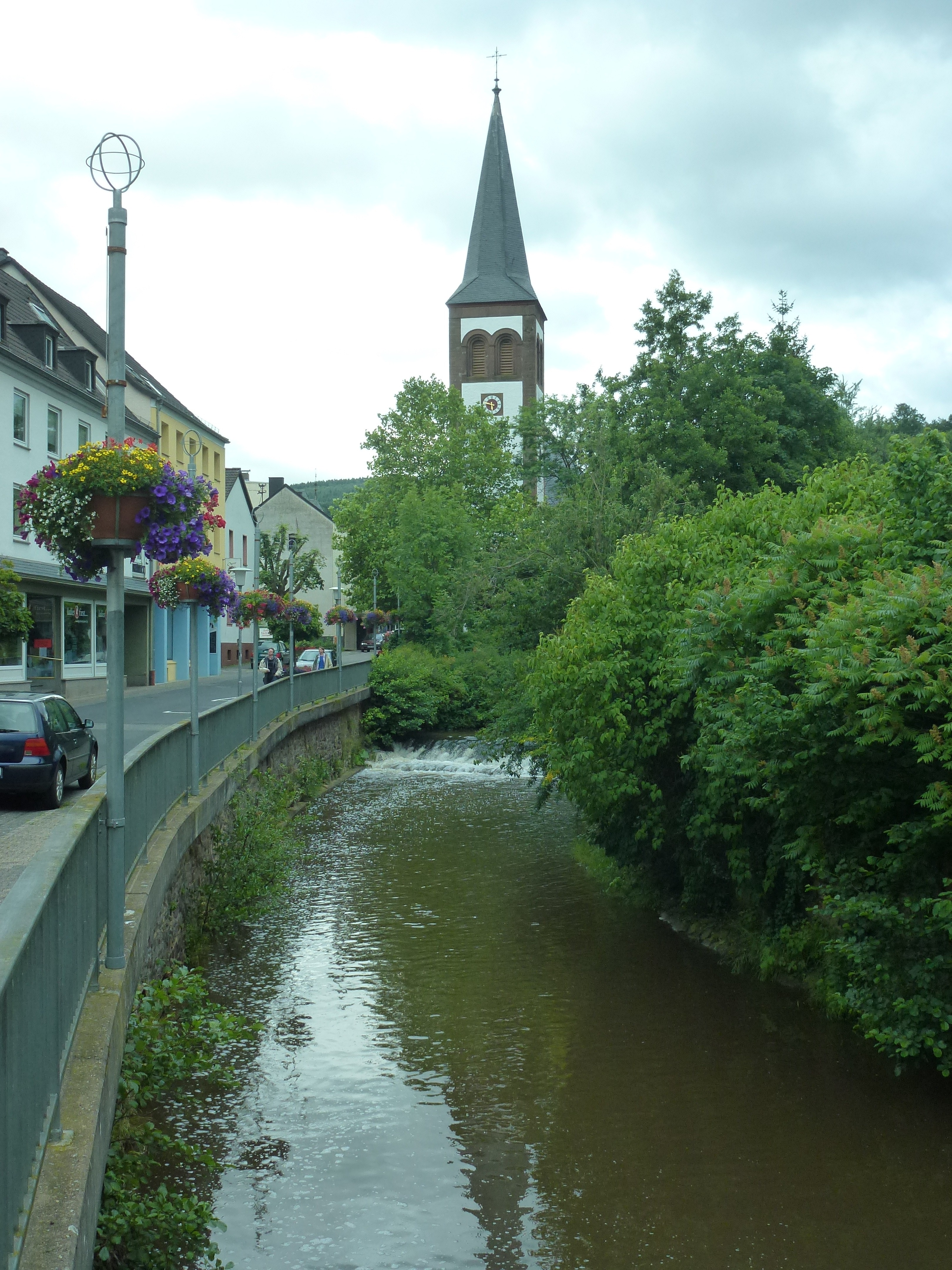 Evangelische Trinitatis-Kirche in Gemünd/Schleiden/Eifel aus dem Jahr 1753, an der Olef gelegen